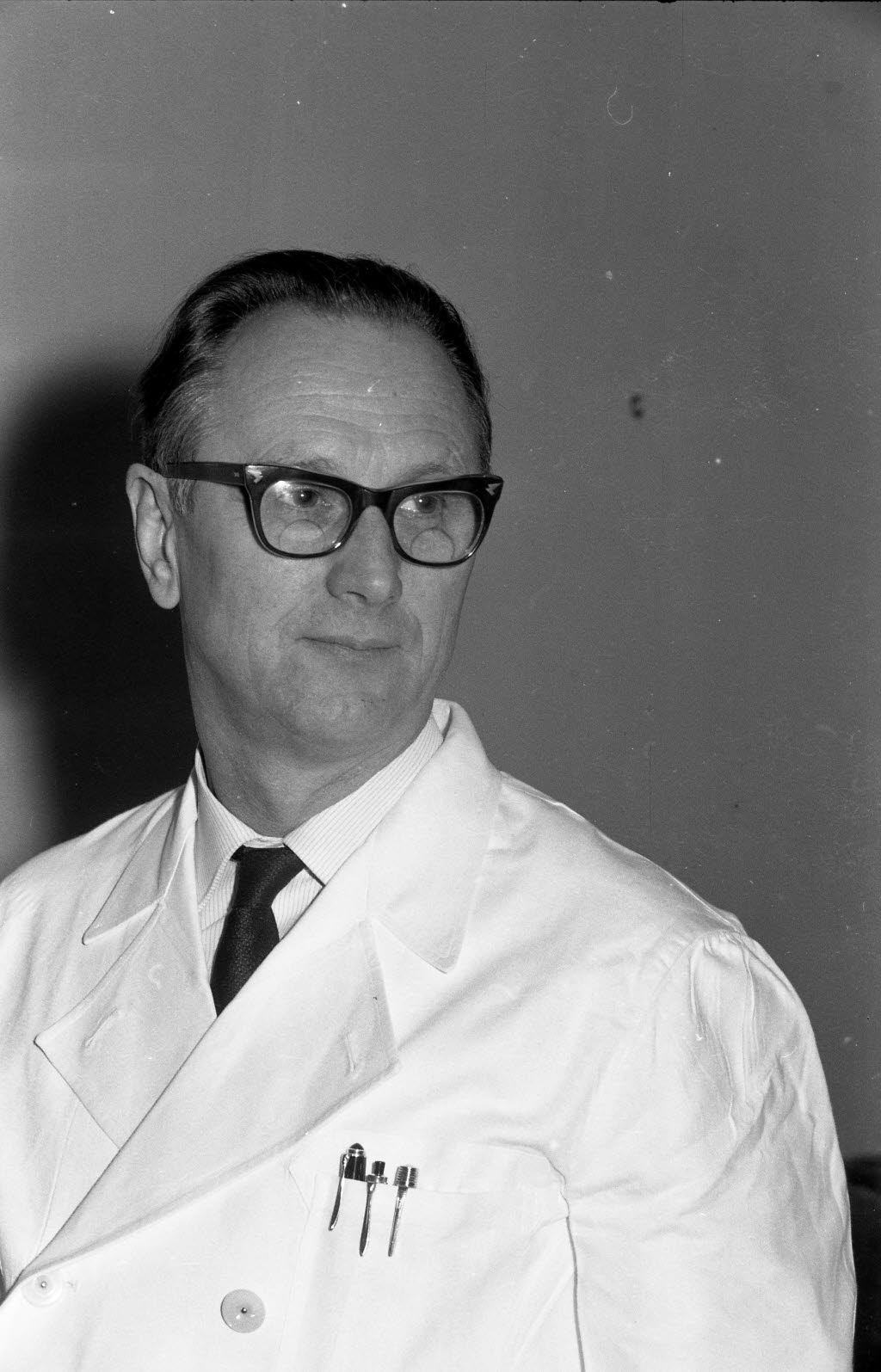 Direktor des Dermatologischen Instituts der Christian-Albrechts-Universität (CAU) und Referent der Kieler Universitätstage 1965 an der Christian-Albrechts-Universität (CAU) zum Thema "Automation in der Entwicklung der modernen Medizin".